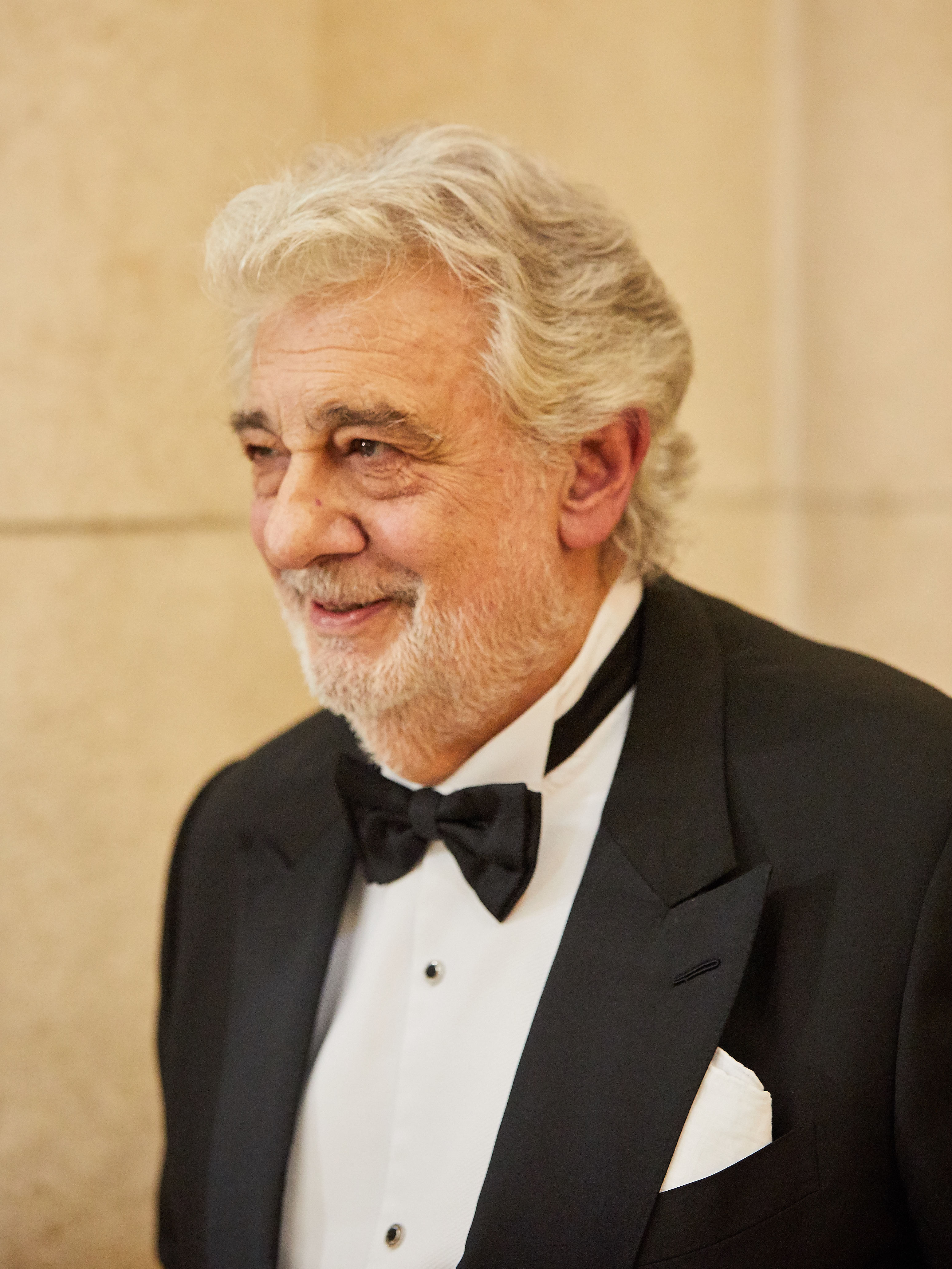 Concierto de Plácido Domingo con motivo del Año Jubilar Mariano (7-06-2019) Firma: Archimadrid / Ignacio Arregui García